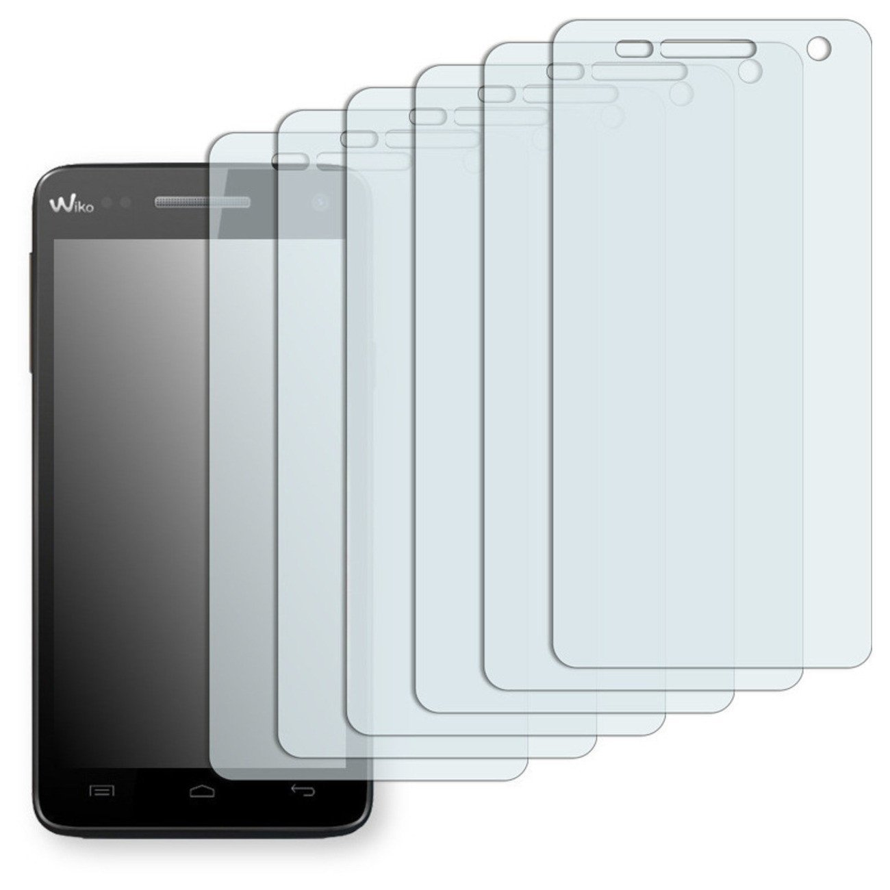 Displayschutzfolie